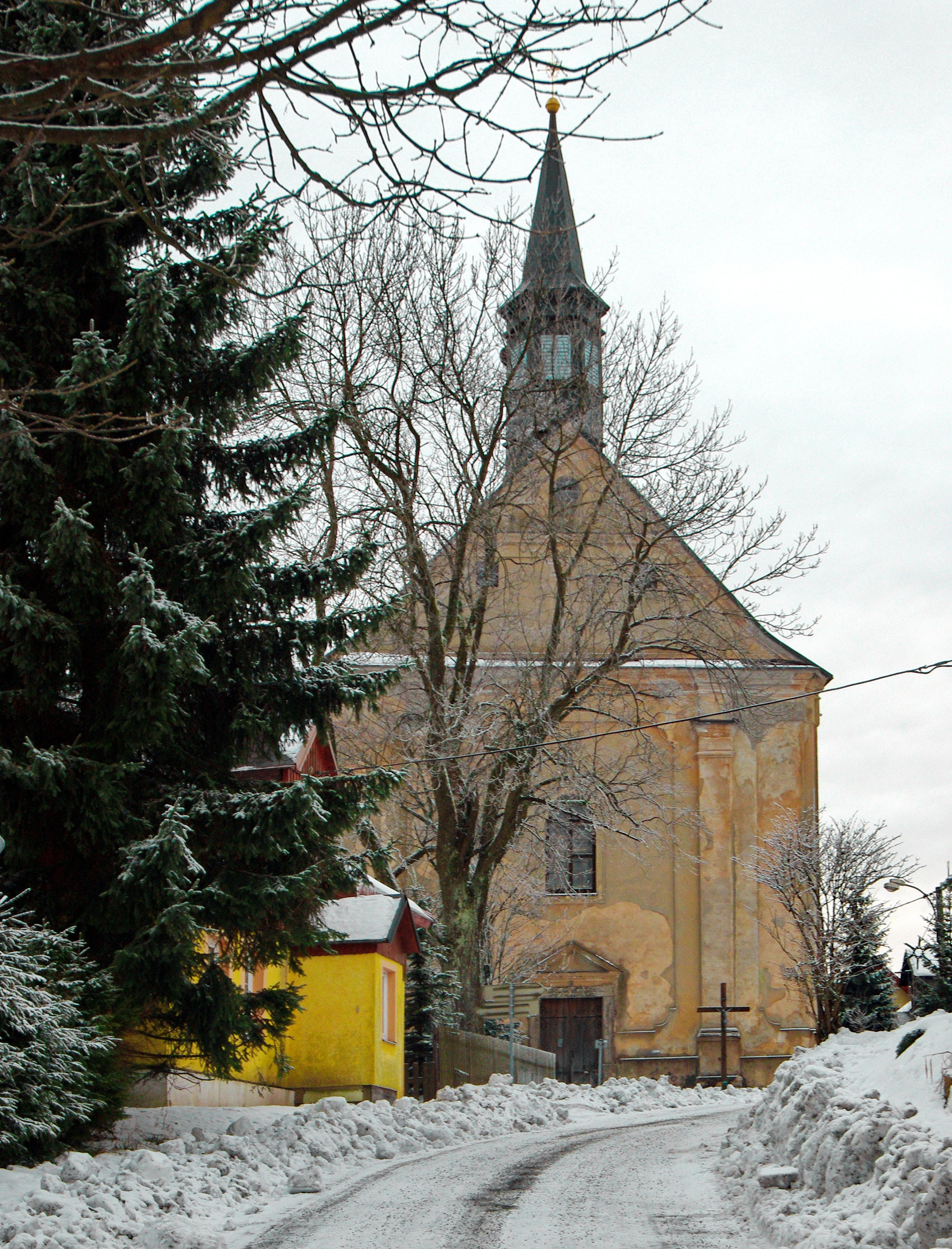 Kostel svatého Bartoloměje, Přebuz.